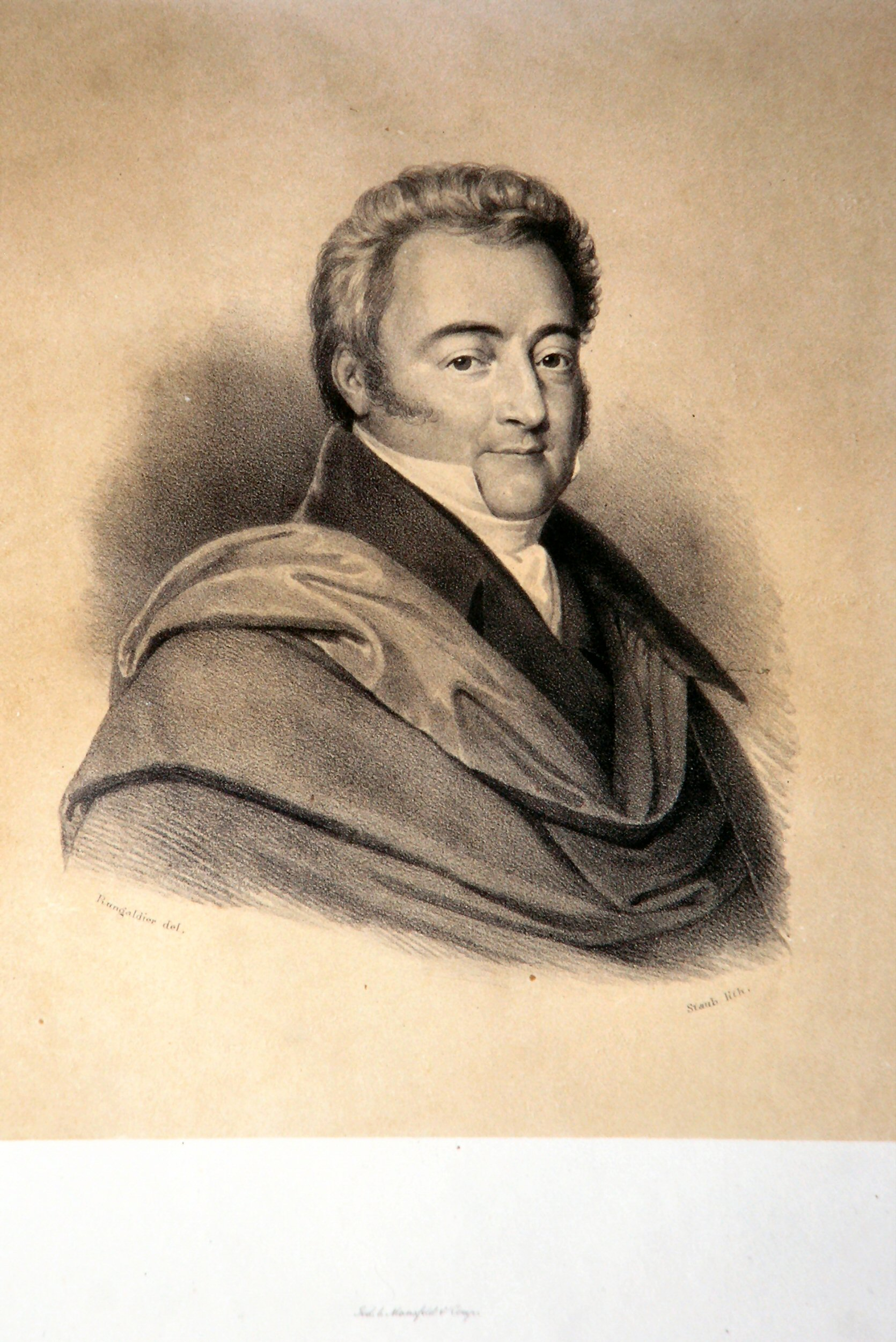 Karl Josef von Clary-Aldringen (1777-1831), Fürst. Lithographie.